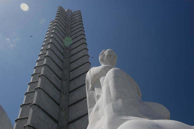 Cuba, september 2005, info in de Metadata